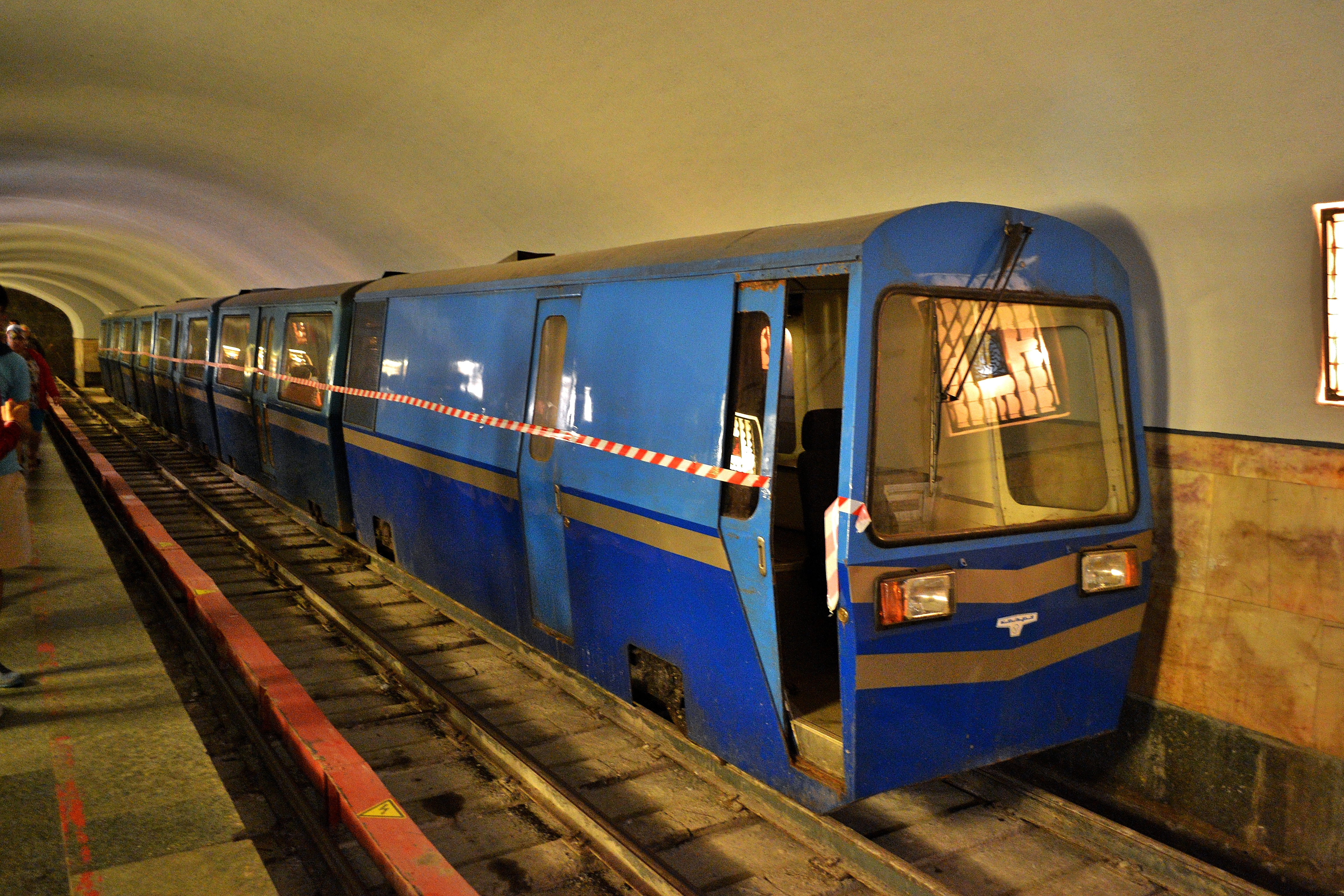 Неэксплуатируемый старый запасной электропоезд ЭП-002 "Турист" на станции Апсны. Новоафонская пещерная ЖД